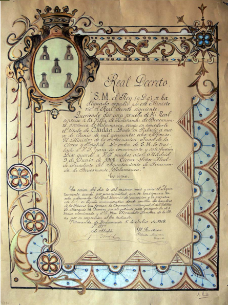 Real Decreto por el que se concede el título de Ciudad a Peñaranda de Bracamonte en el año 1908.